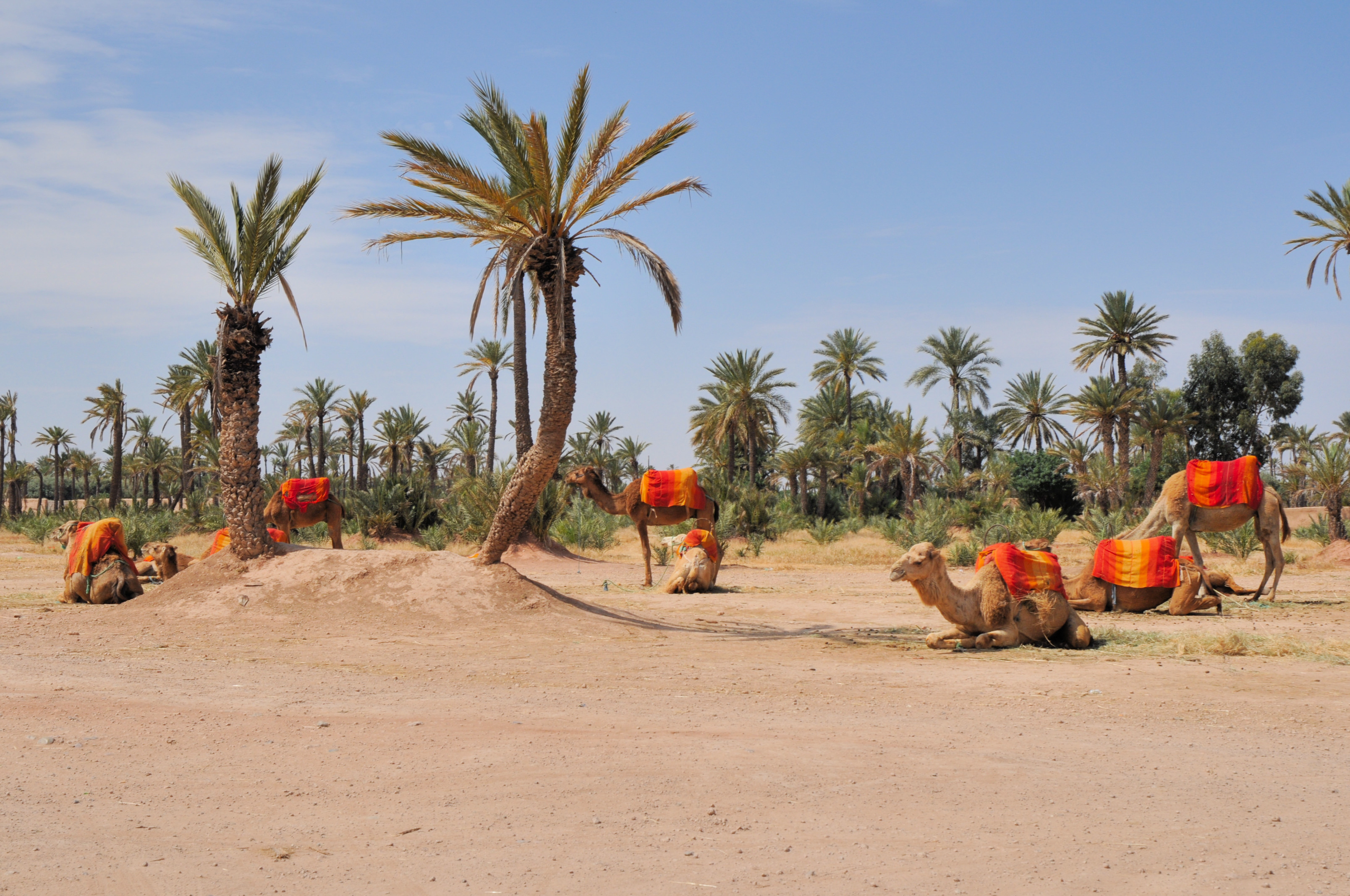 La_Palmeraie_de_Marrakech_709.JPG MAROC